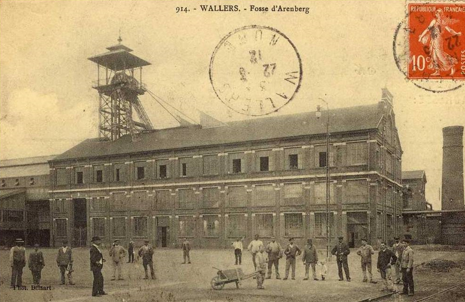 Ce document a été réalisé avec l’aimable autorisation de la Communauté d'agglomération de la Porte du Hainaut. Français | +/−